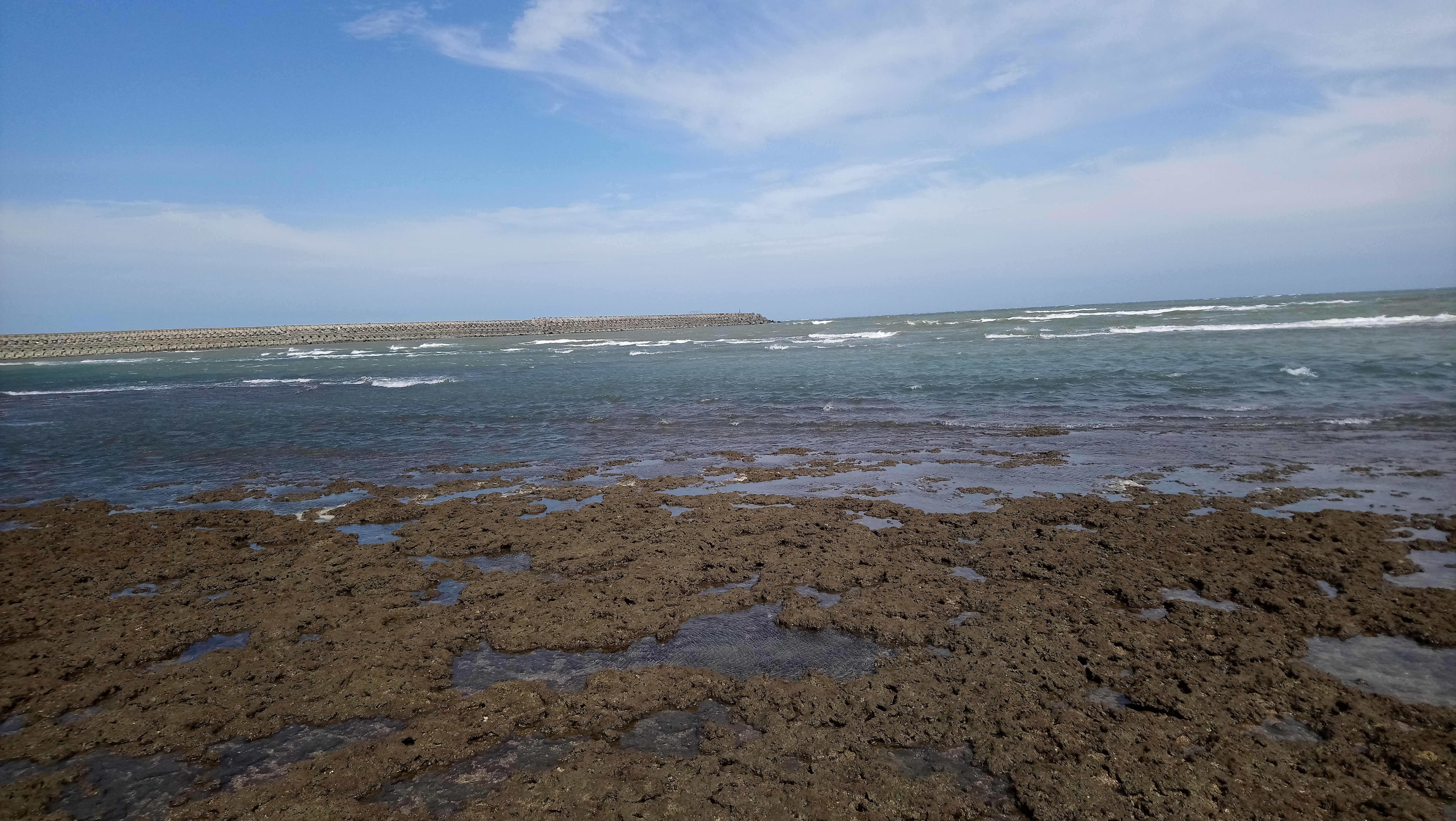 活生生的千年藻礁是由無節珊瑚藻類死亡鈣化後，沉積於礫石灘上所形成石灰岩礁體的｢植物礁｣，平均10年才可生成1公分。